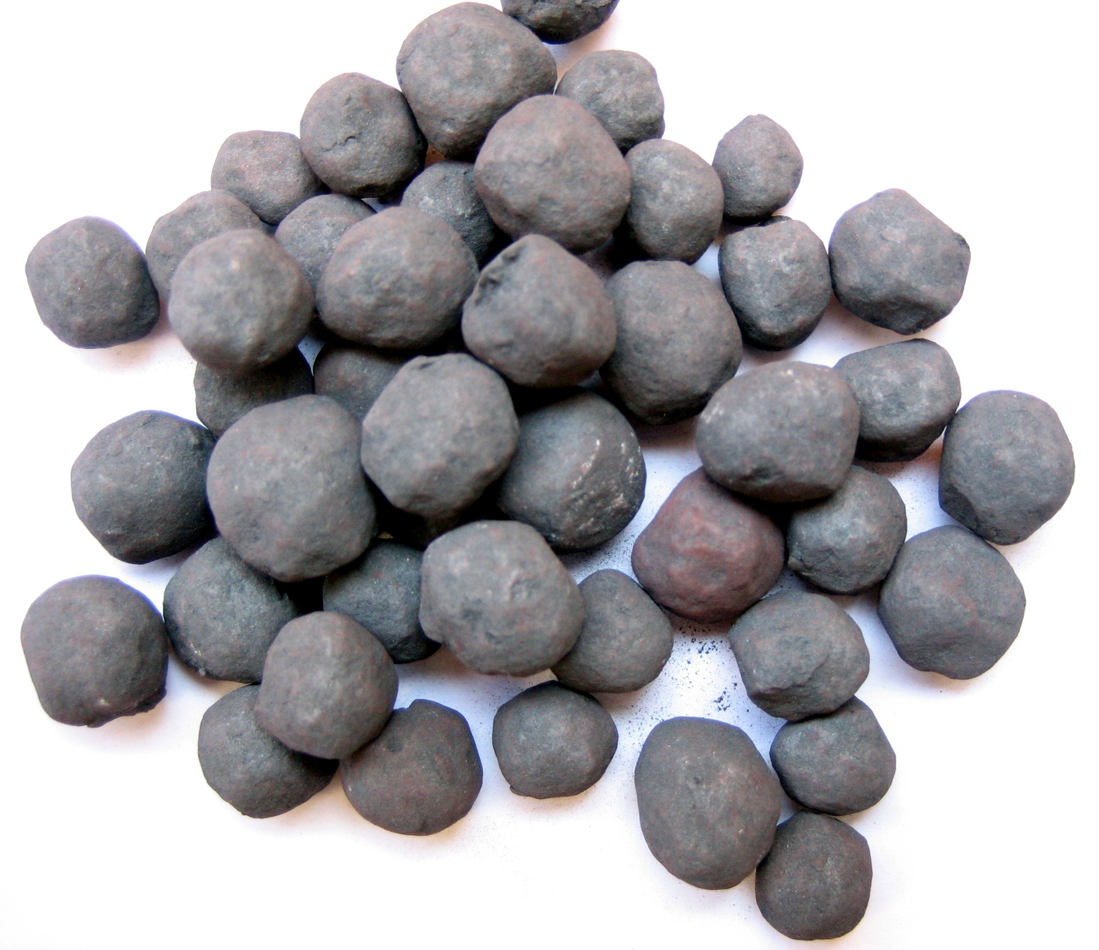 Prisodrinta geležies rūda. Geležies kiekis iki 70 %. Švedija. 2006 liepa